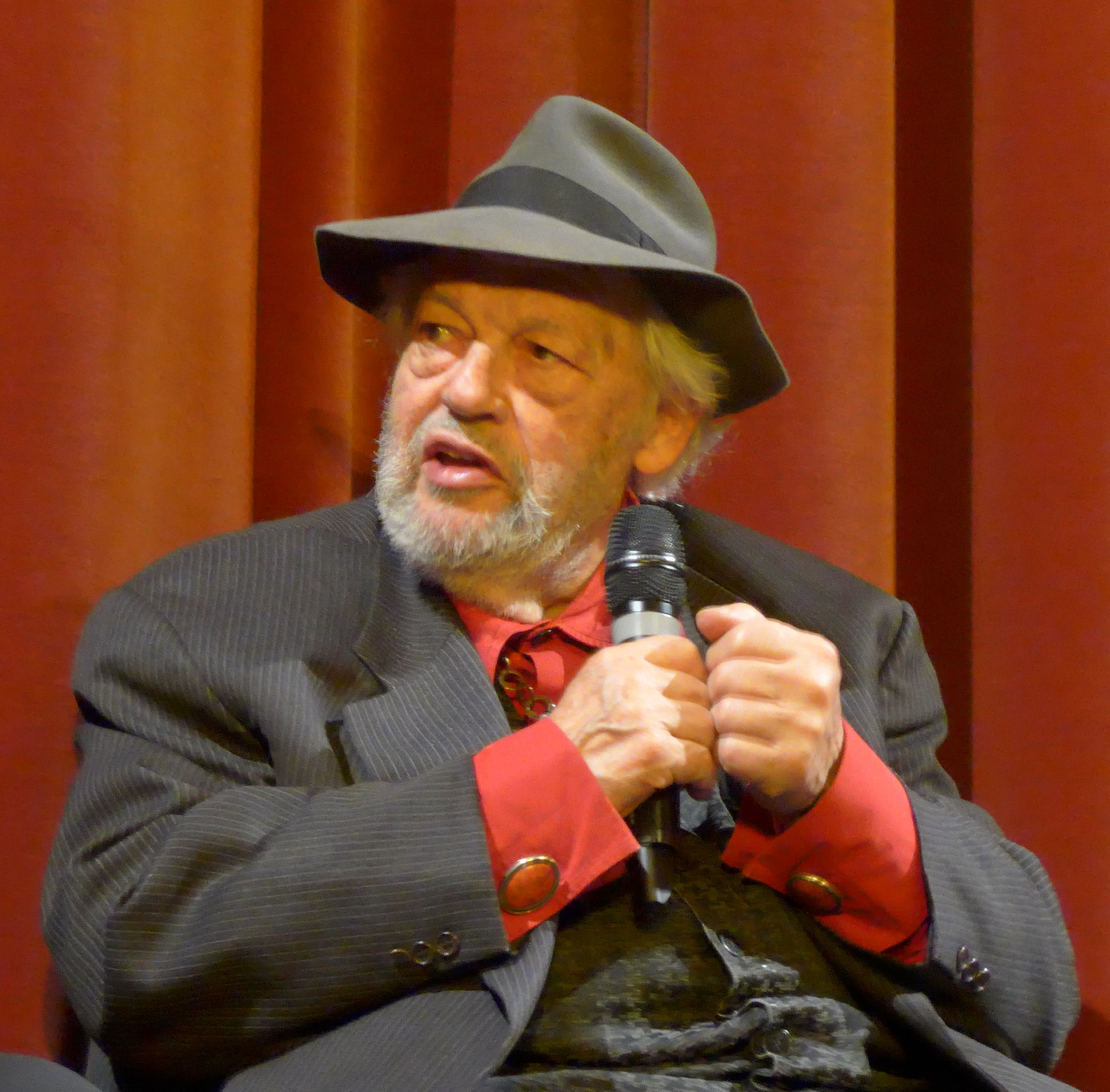 Peter Berling nach der Vorführung von "Verfluchte Liebe deutscher Film" auf der Berlinale 2016